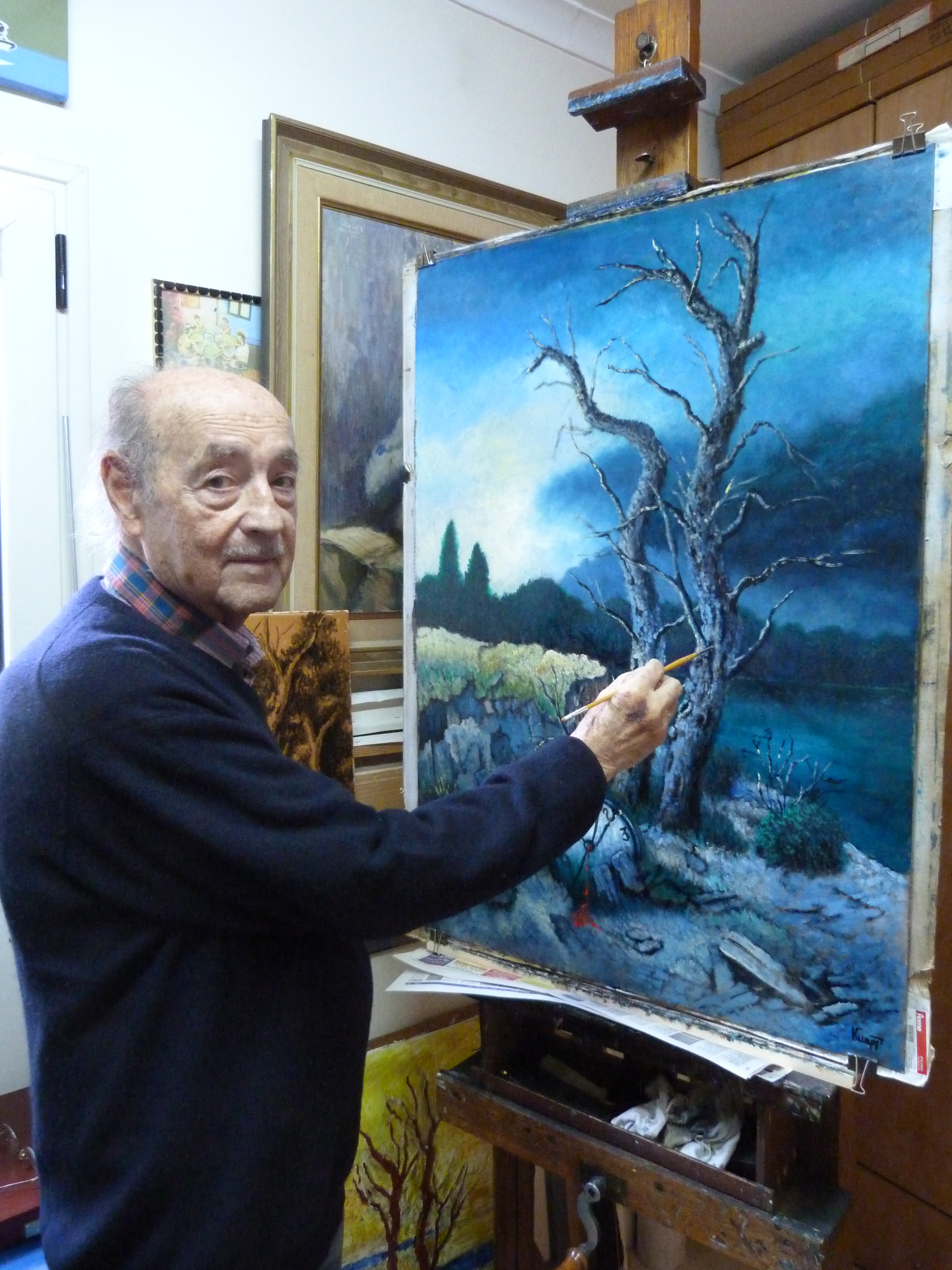 Zeev Kun bei seiner Staffelei in seinem Studio